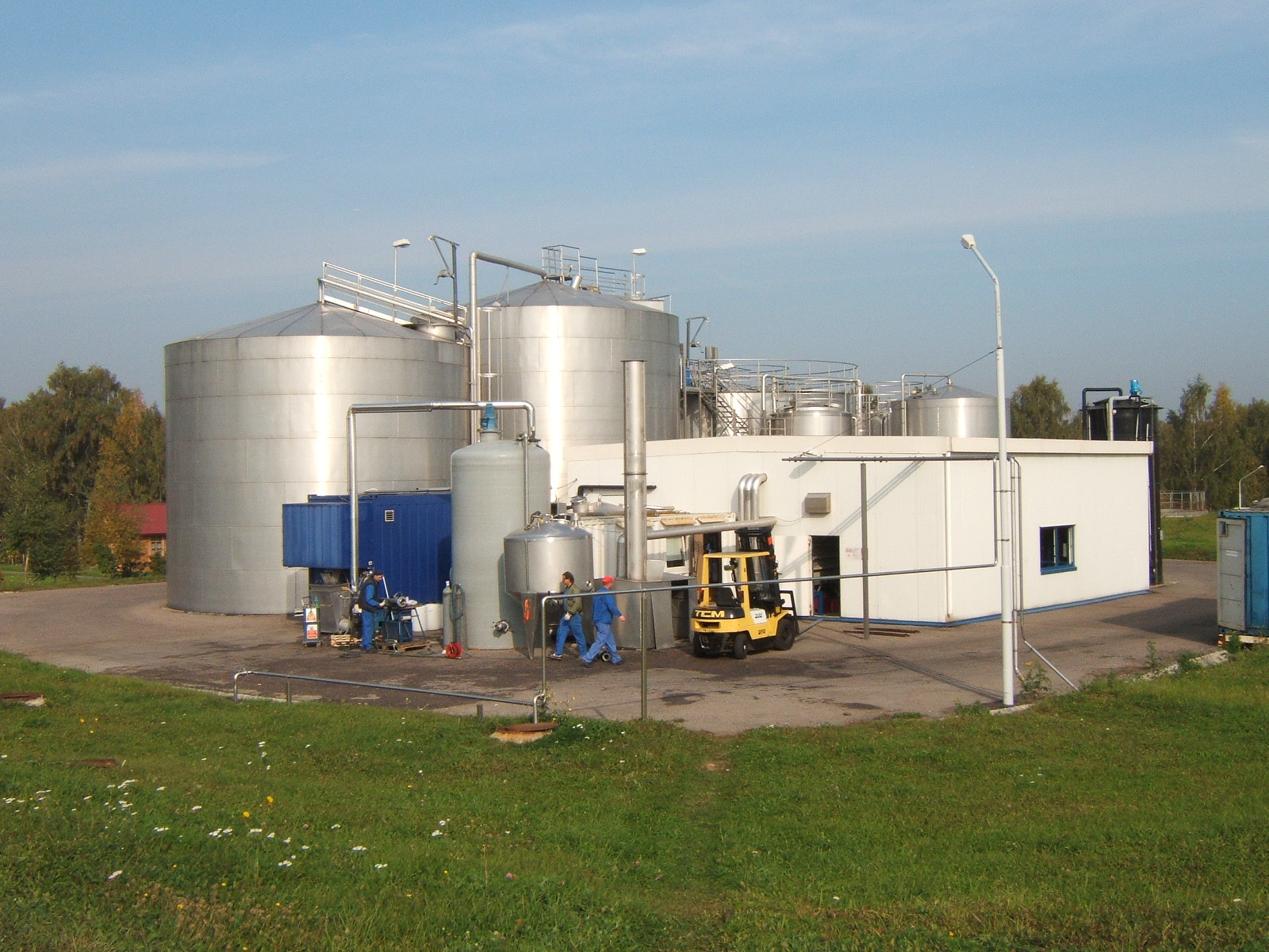 очистные эрманн